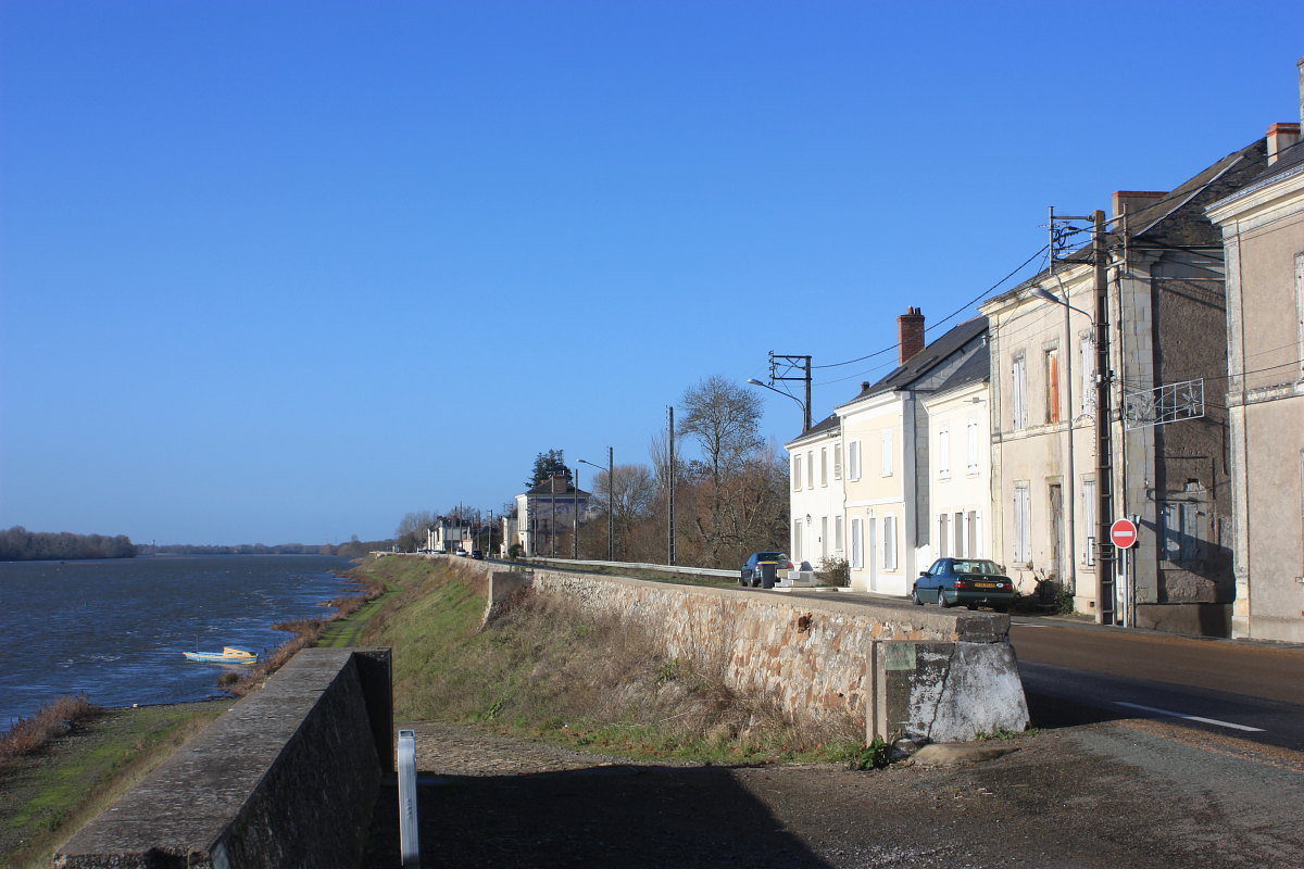 La levée Jeanne de Laval à La Bohalle, le long de la Loire